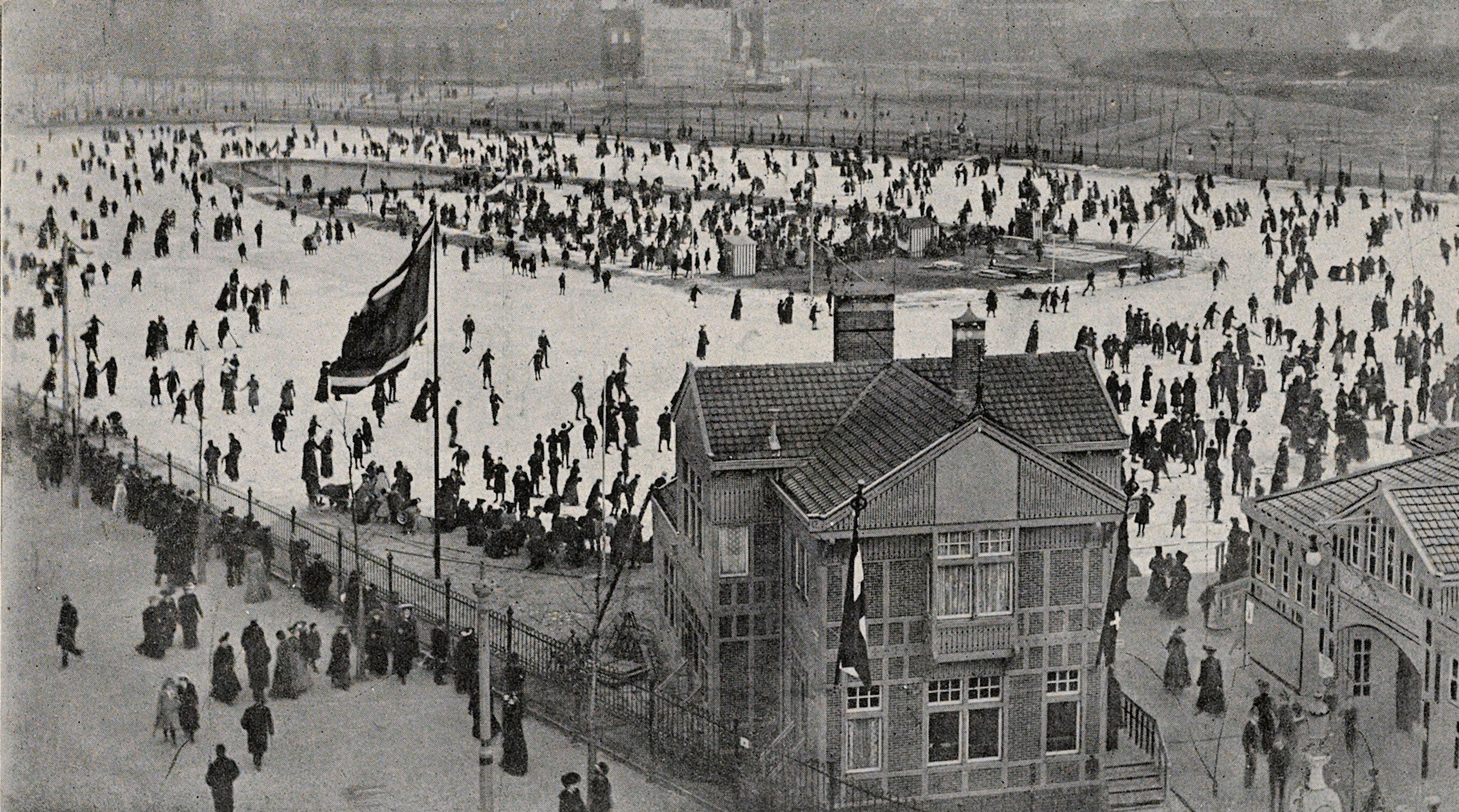 Beschrijving Museumplein, IJsclub. Uitgave N.J. Boon, AmsterdamDocumenttype prentbriefkaartVervaardiger Boon, N.J. (uitgever)Collectie Collectie Stadsarchief Amsterdam: prentbriefkaartenDatering 1900Geografische naam MuseumpleinInventarissen PRKBB00492000015 Generated with Dememorixer